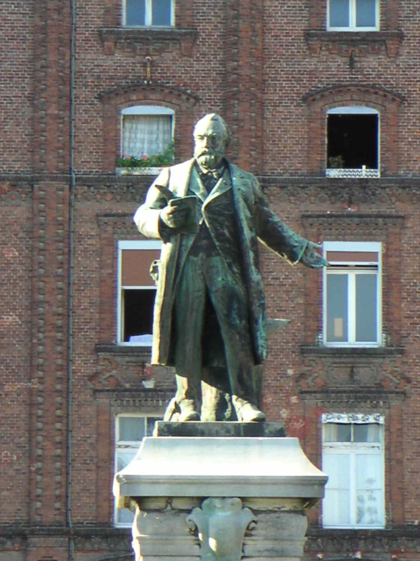 Cette photo de la statue de Jean-Baptiste André Godin installée à Guise a été prise par User:LonganimE le 03/sept/2005.